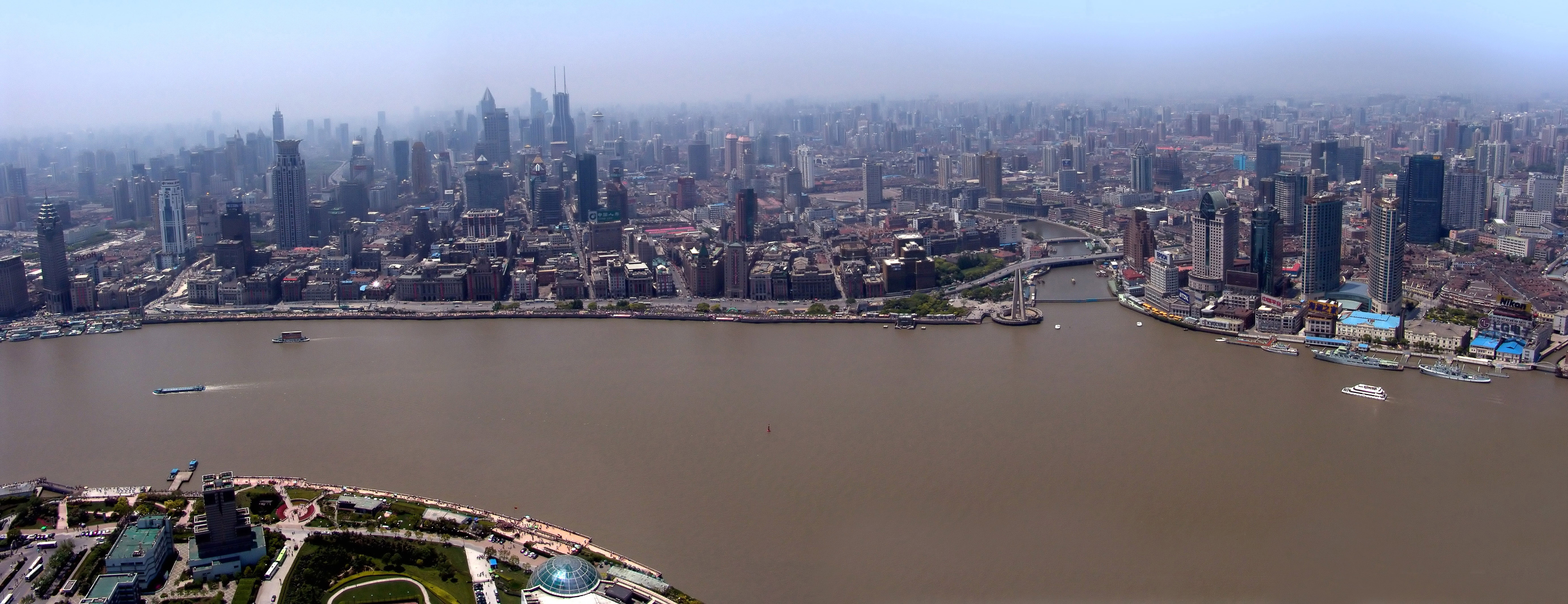 Панорама западного берега с телебашни.